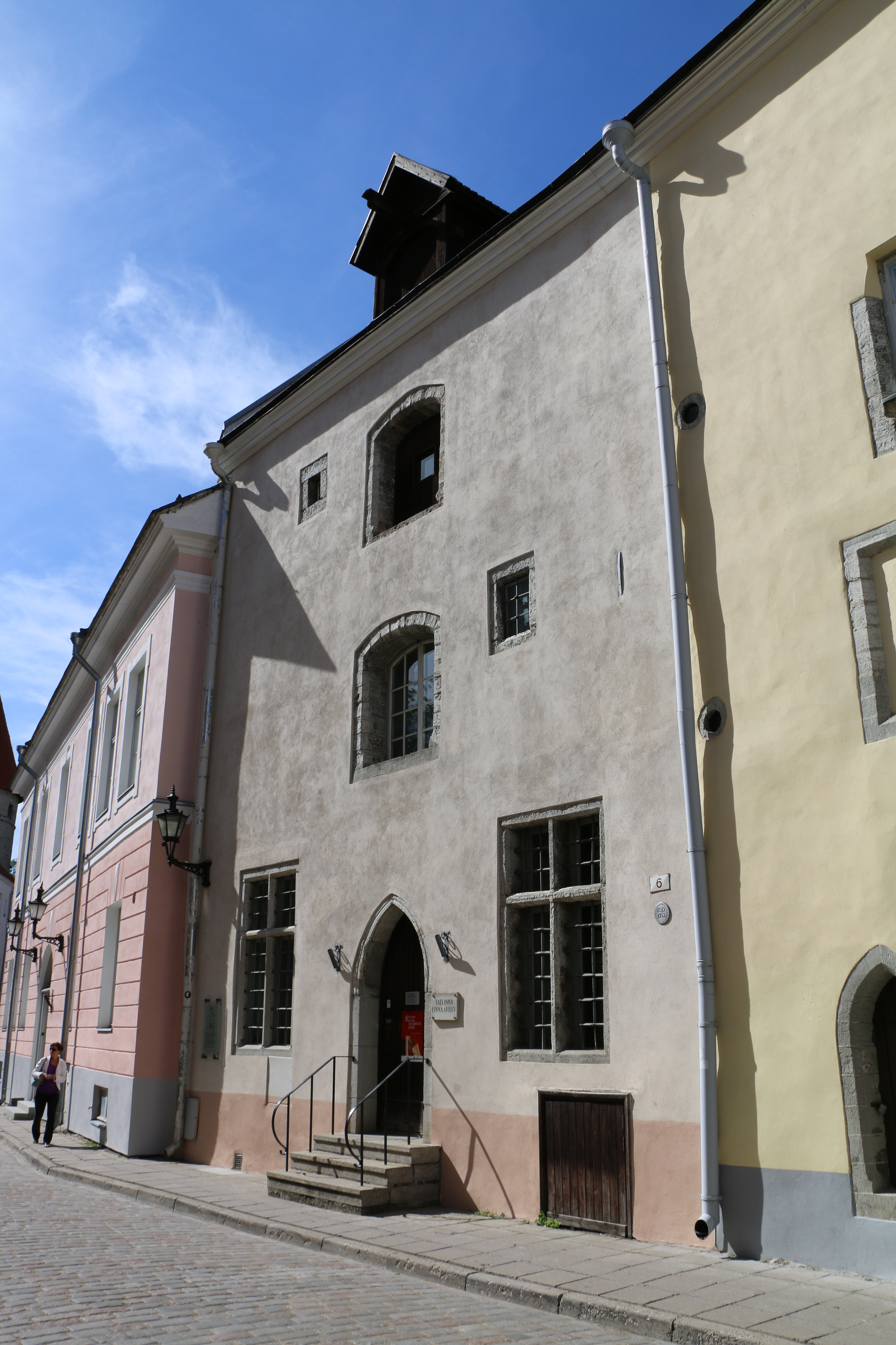 Tallinna Linnaarhiiv paremalt